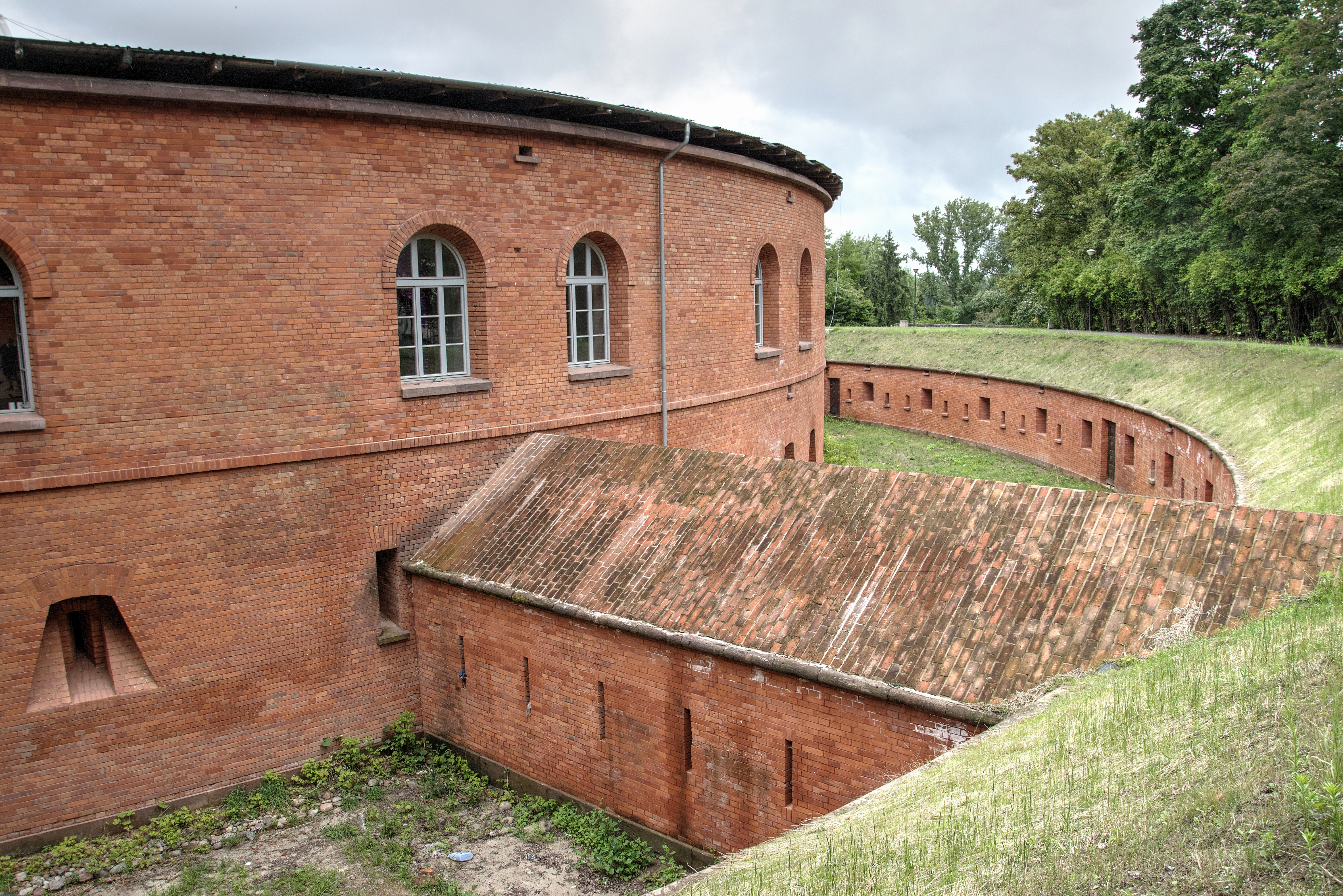 Fort Legionów Cytadeli Warszawskiej